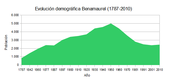 Evolución demográfica del municipio de Benamaurel (España).